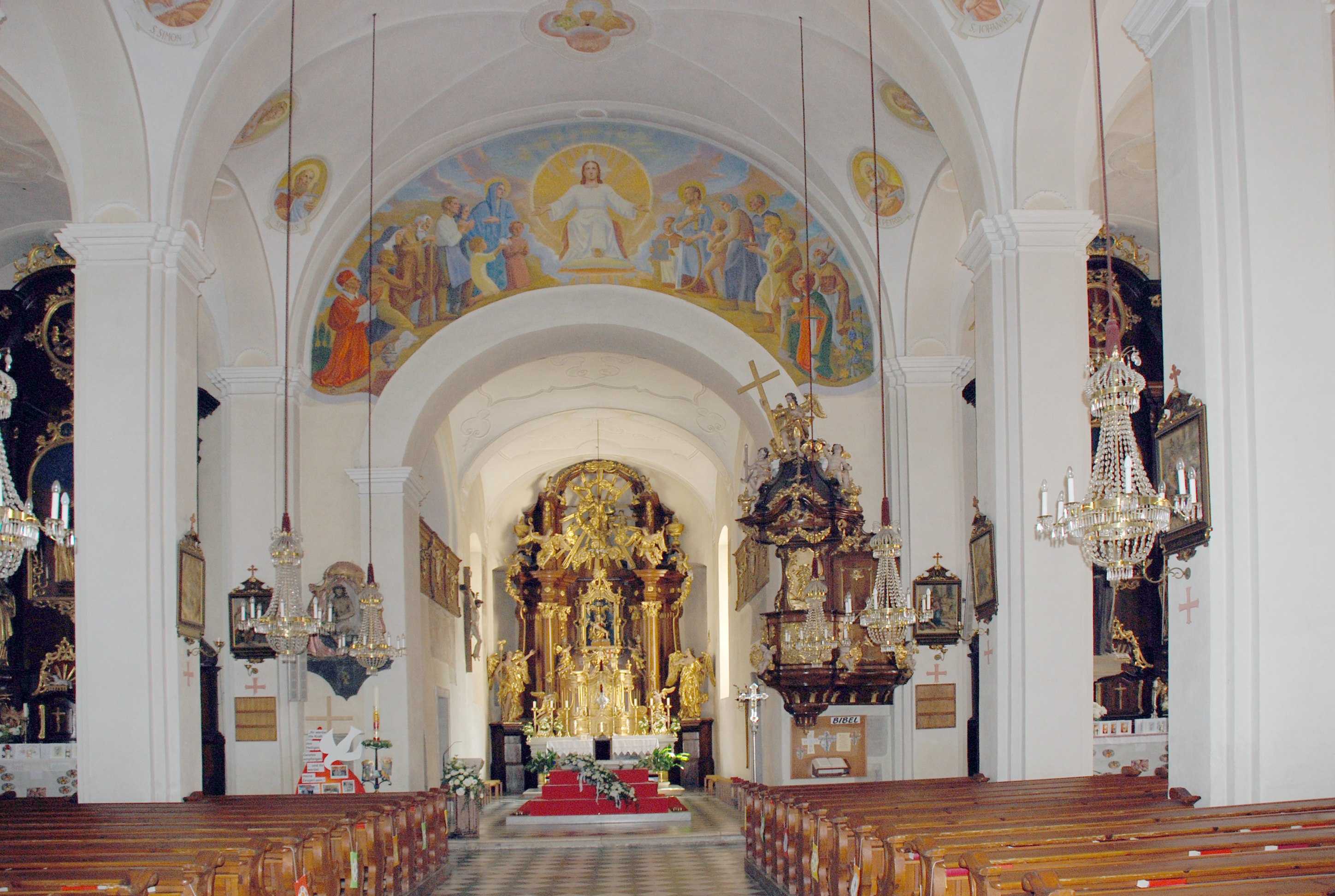 Eibiswald, Steiermark, Österreich: Pfarrkirche Kirchenschiff